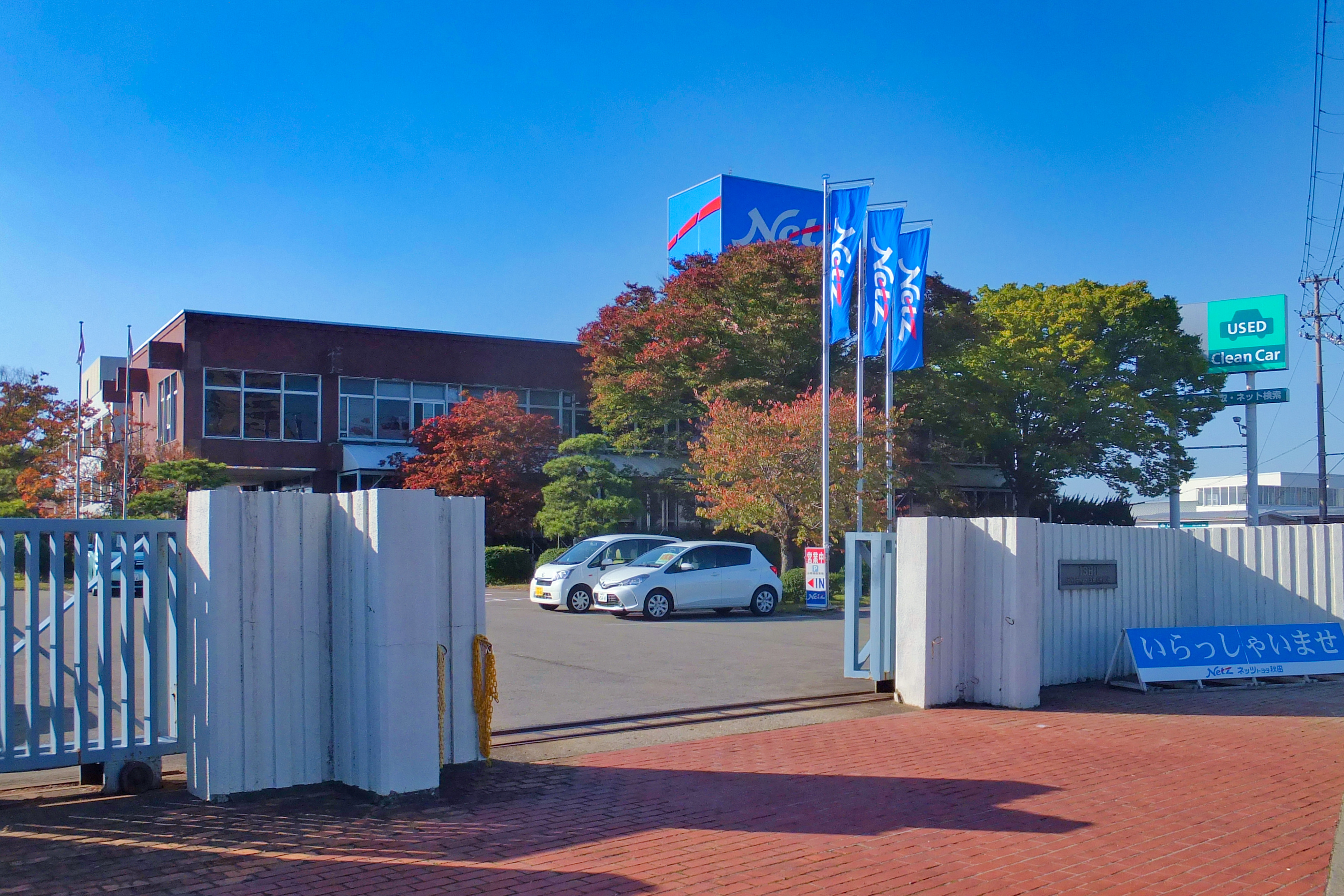 ネッツトヨタ秋田 本社（秋田市川尻町字大川反）